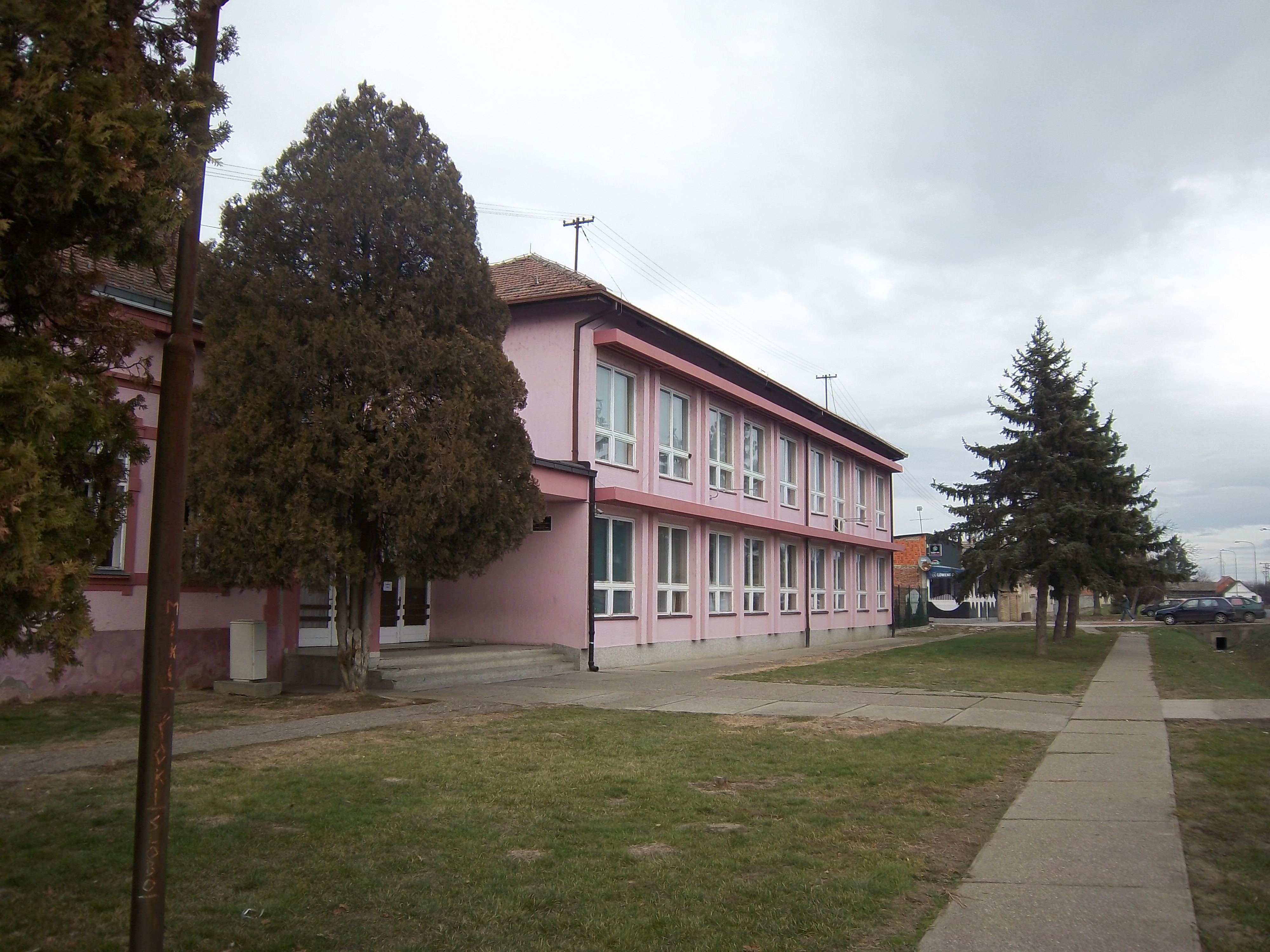 Osnovna škola u Boboti, u općini Trpinja